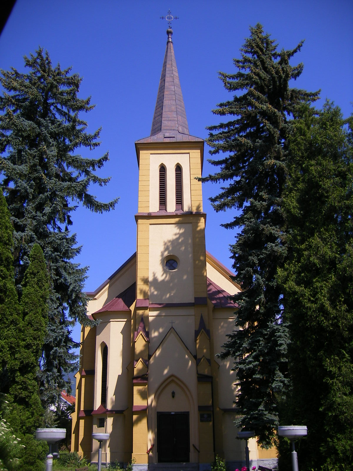 Vrútky - evanjelický kostol